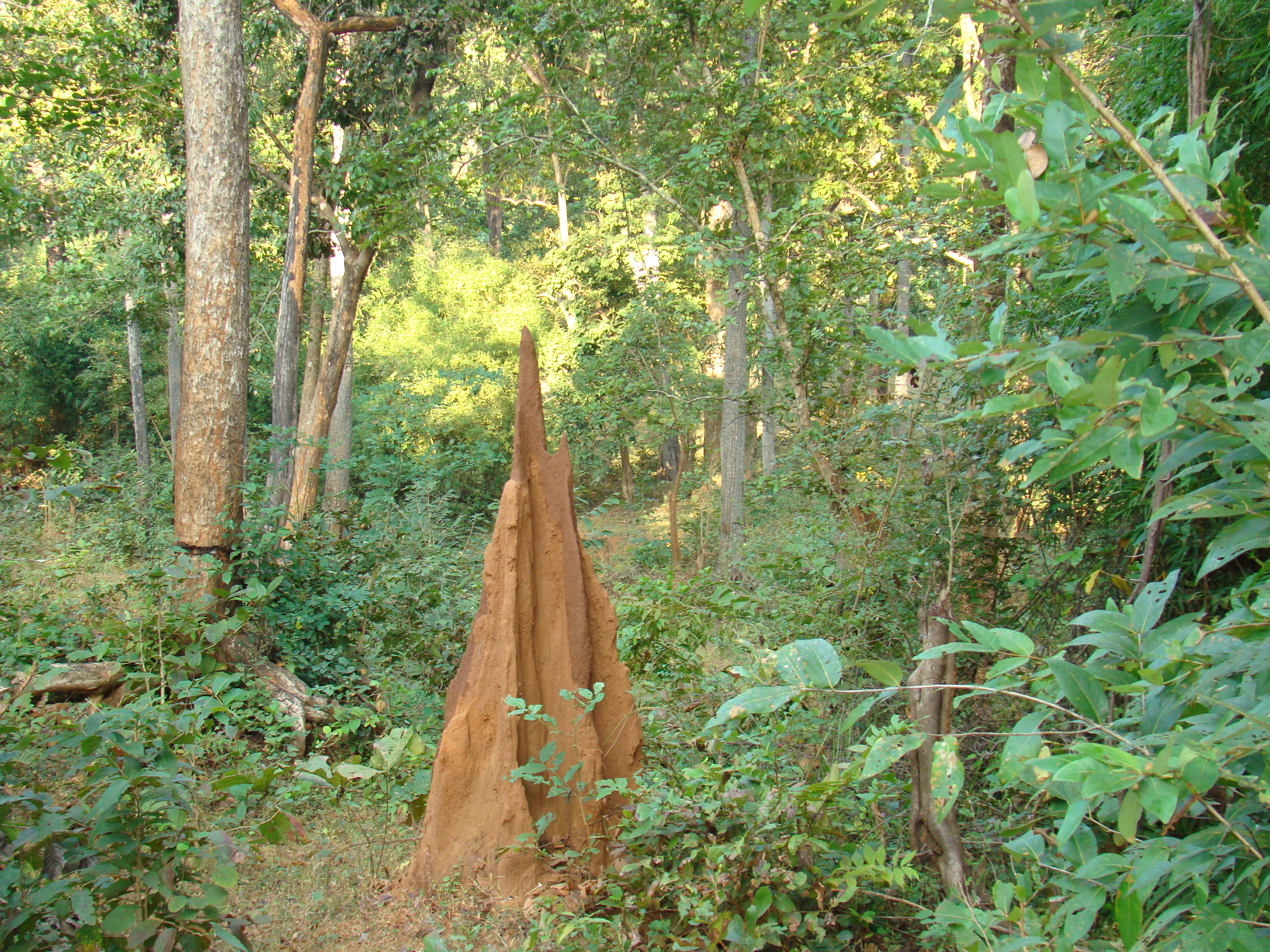 वाळवीची वसाहत